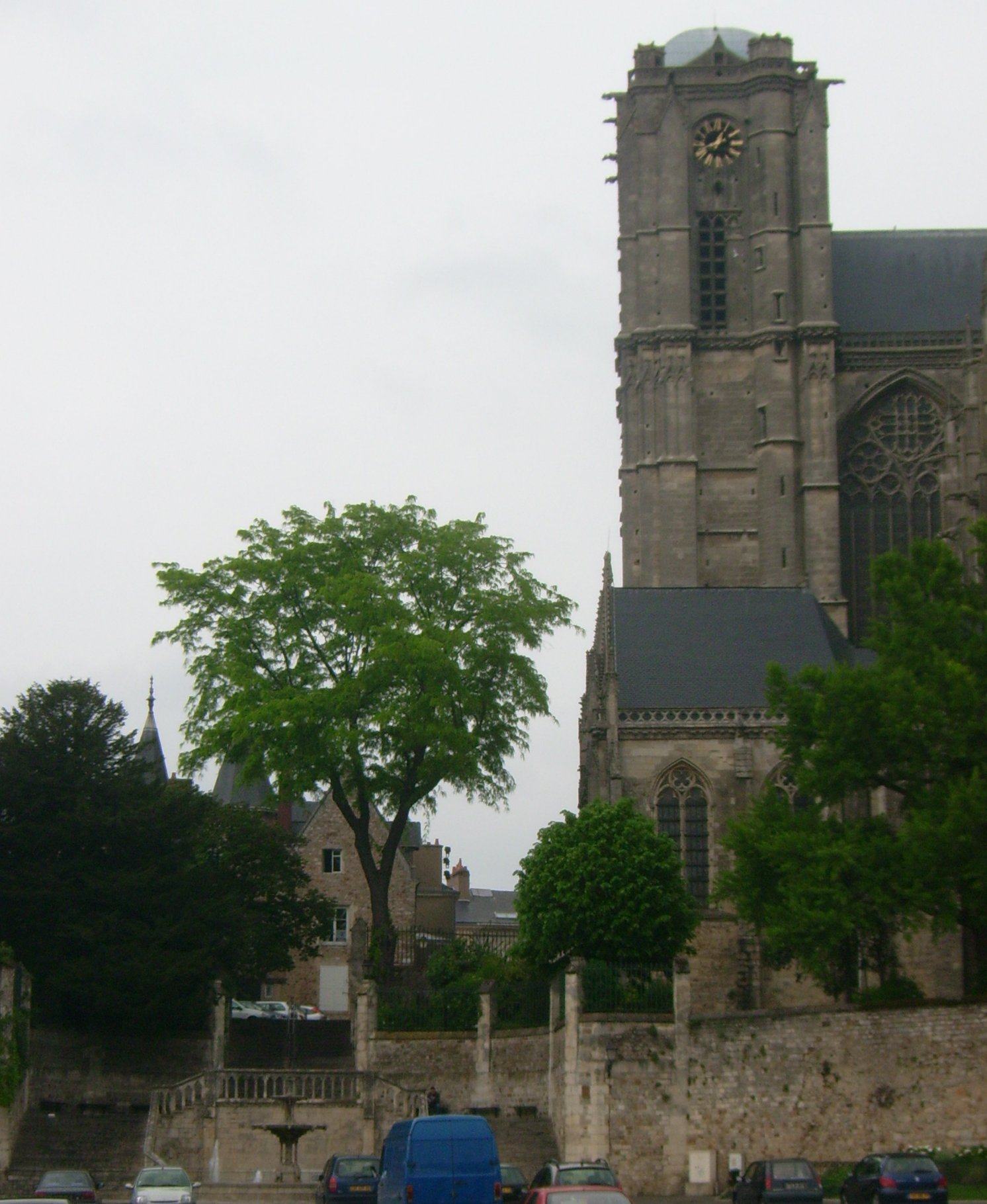 Place du jet d'eau au Mans avec vue de St Julien